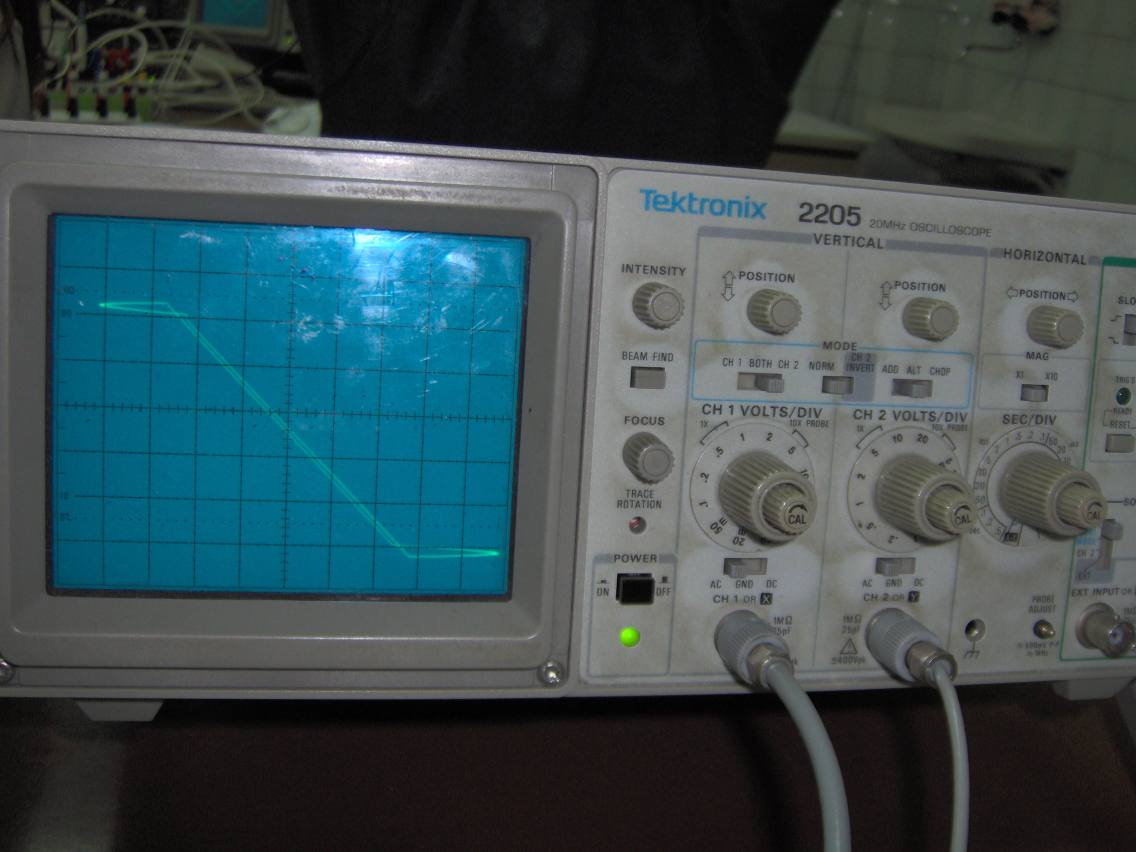 Osciloskop Tektronix 2205 v režime X-Y. V laboratóriu Katedry merania FEI STU Bratislava. Licensing